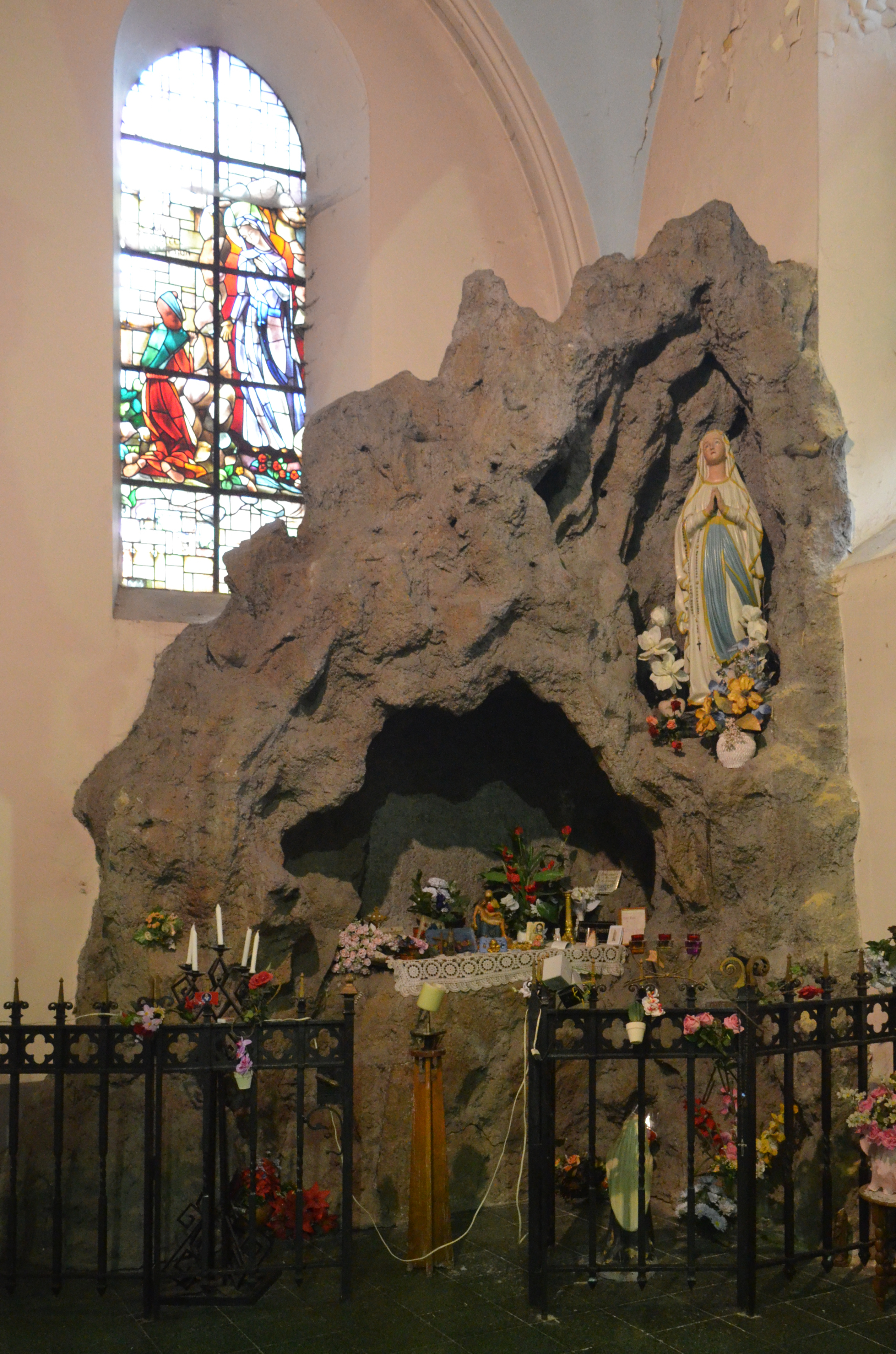 Charleroi - Église Saint-Joseph (la Broucheterre) - la grotte Notre-Dame de Lourdes.